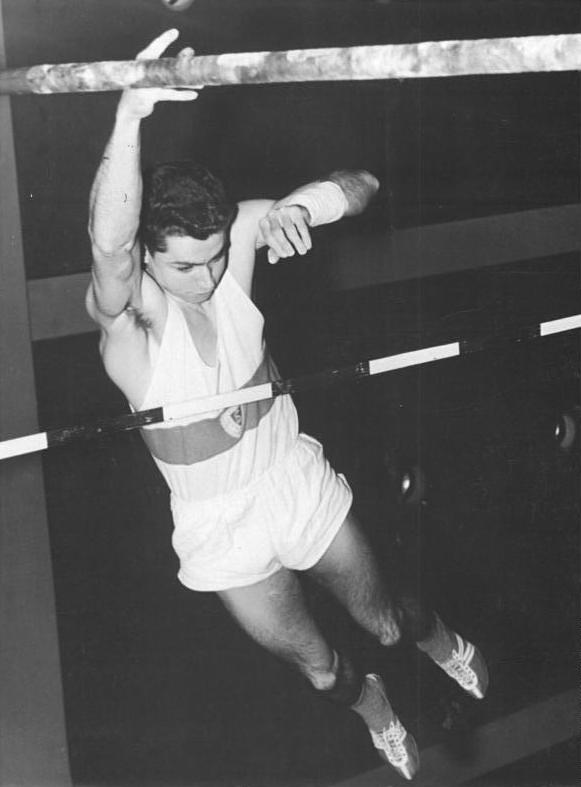 Wolfgang Norwig Zentralbild Kohls Wen-Krz I. Deutsche Leichtathletik-Meisterschaften der Männer und Frauen wurden am 16.2.1964 in der Berliner Dynamo-Sporthalle durchgeführt. Wolfgang Nordwig vom SC Motor Jena stellte im Stabhochsprung mit 4,80 m einen neuen deutschen Rekord auf. UBz: Wolfgang Norwig bei seinem Rekordsprung über 4,80 m.